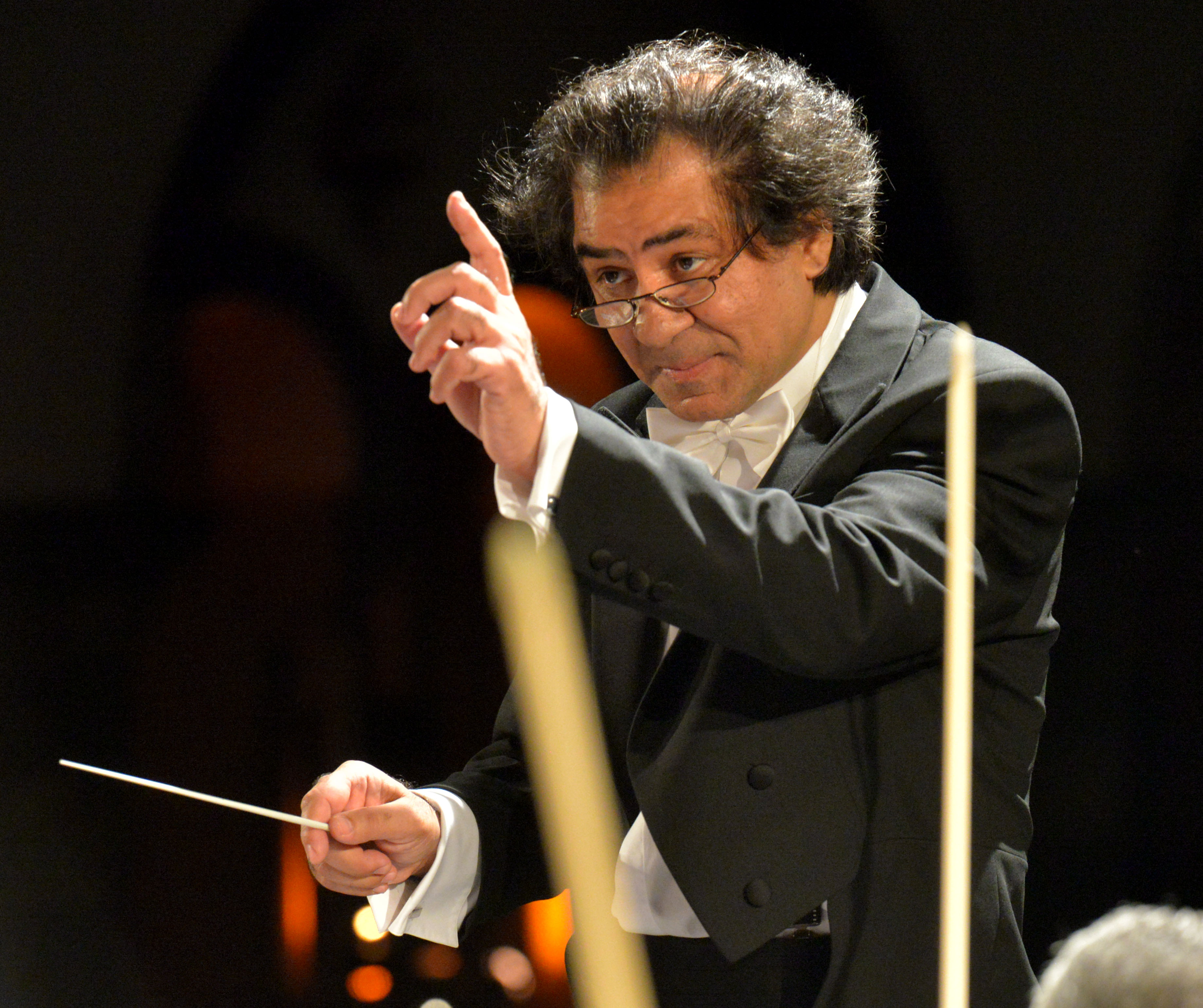 Riccardo M Sahiti ist künstlerischer Leiter und Dirigent der Roma und Sinti Philharmoniker.